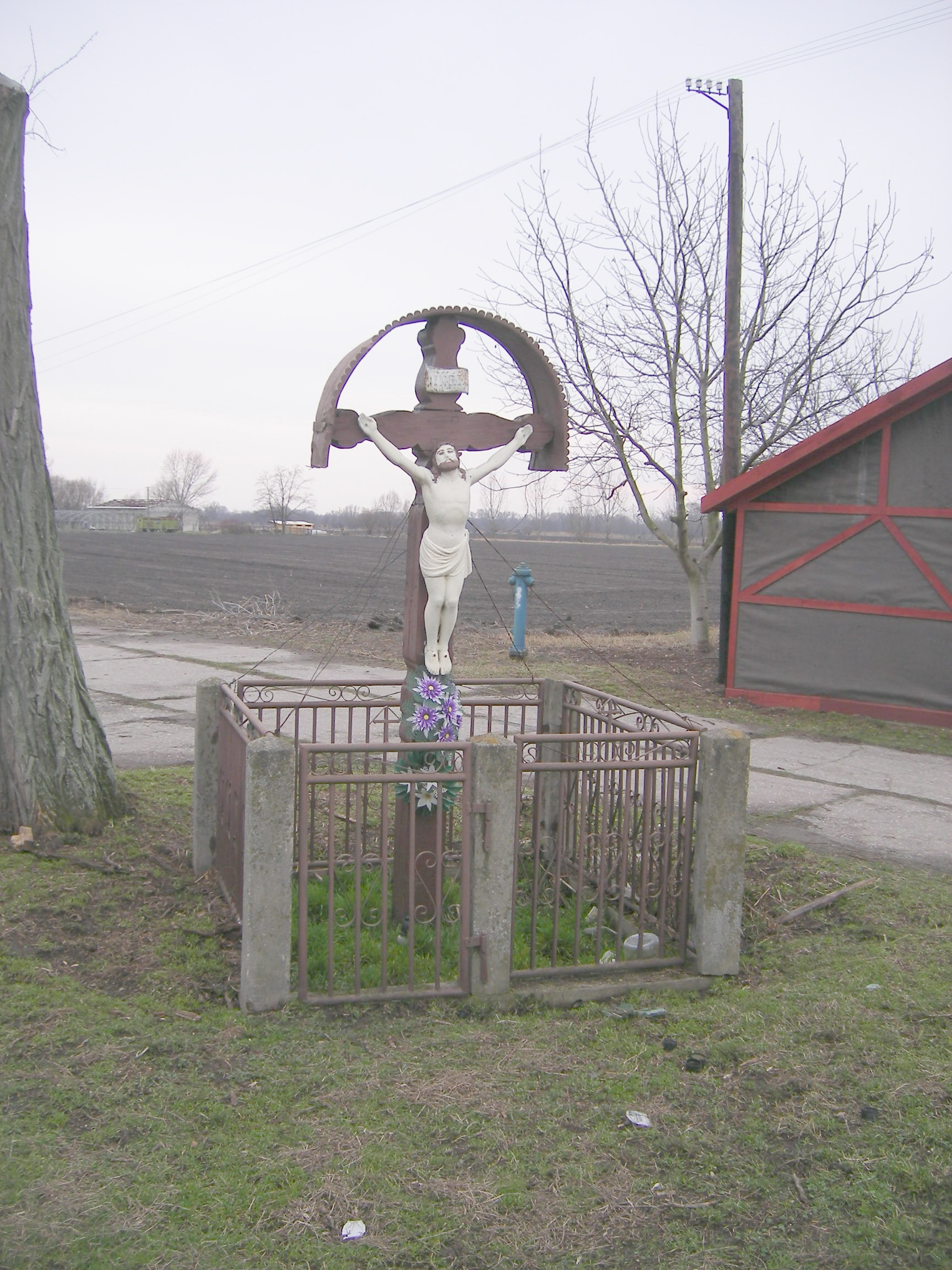 Vék - útmenti kereszt